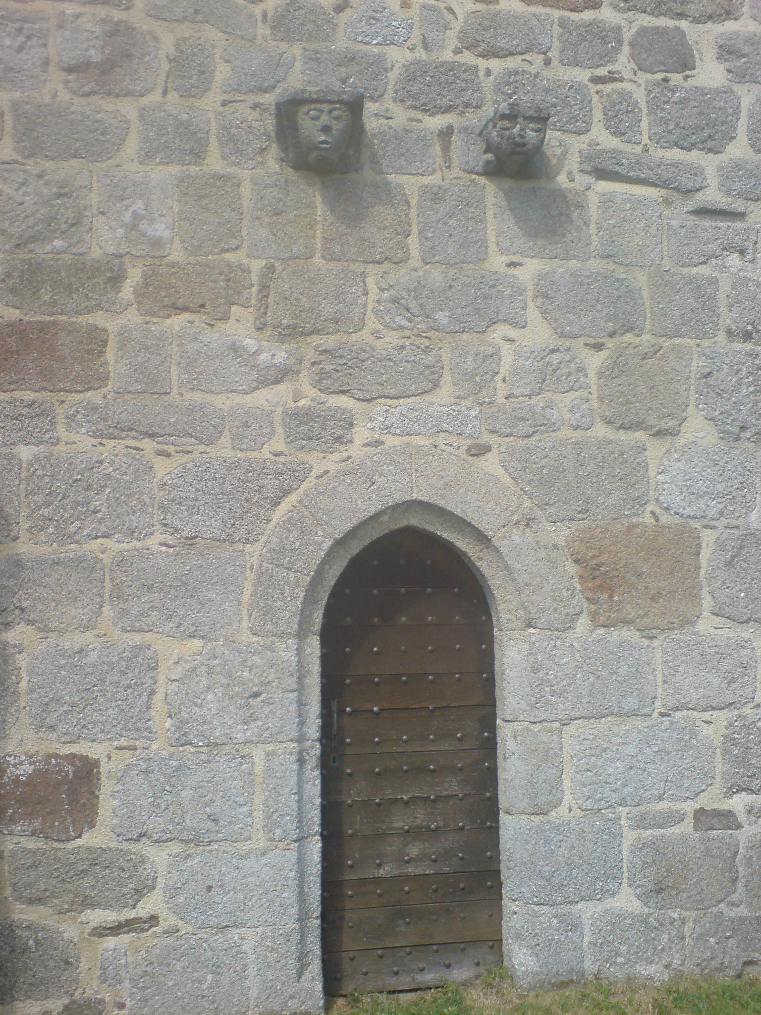 L’église Saint-Pierre de Courteix est à l’origine une chapelle templière (Ordre du Temple) du XIIIe siècle. Le portail sud est la seule entrée dans la construction d’origine. Deux culots sculptés la surmontent.